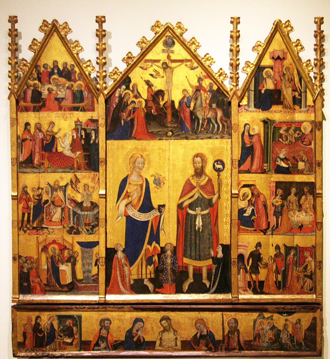 Procedeix de la capella del castell de Santa Coloma de Queralt (Conca de Barberà).